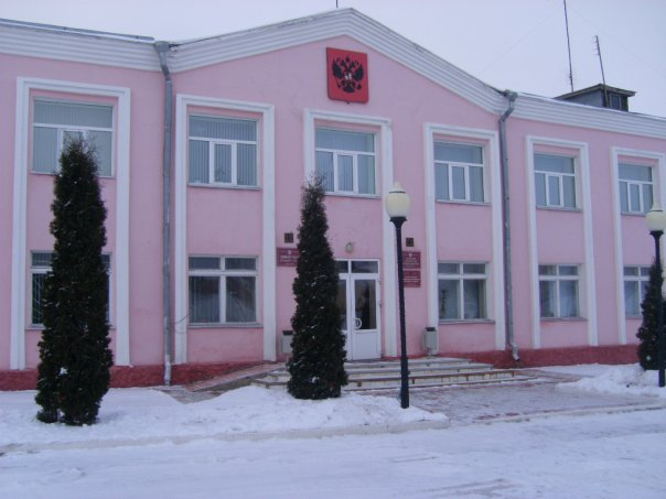 Администрация Хотынца